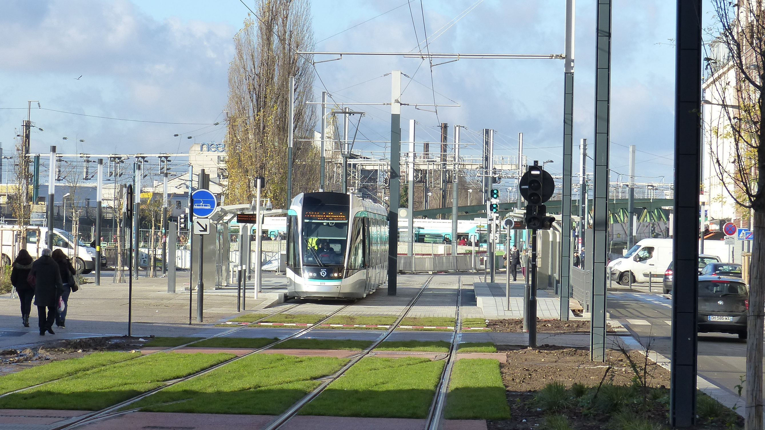 Tramway de la ligne T8 à l'arrêt, station Gare de Saint-Denis.Au fond, passage d'une rame de la ligne T1.A gauche, potence porte-caténaire des lignes SNCF et viaduc métallique de la RD 24